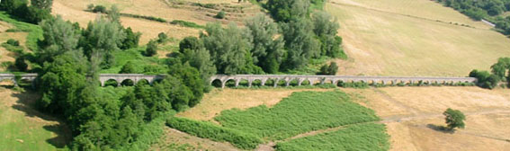 L'aqueduc de Mezzana, ouvrage du canal de la Gravona, dit de Ponte Bonello.